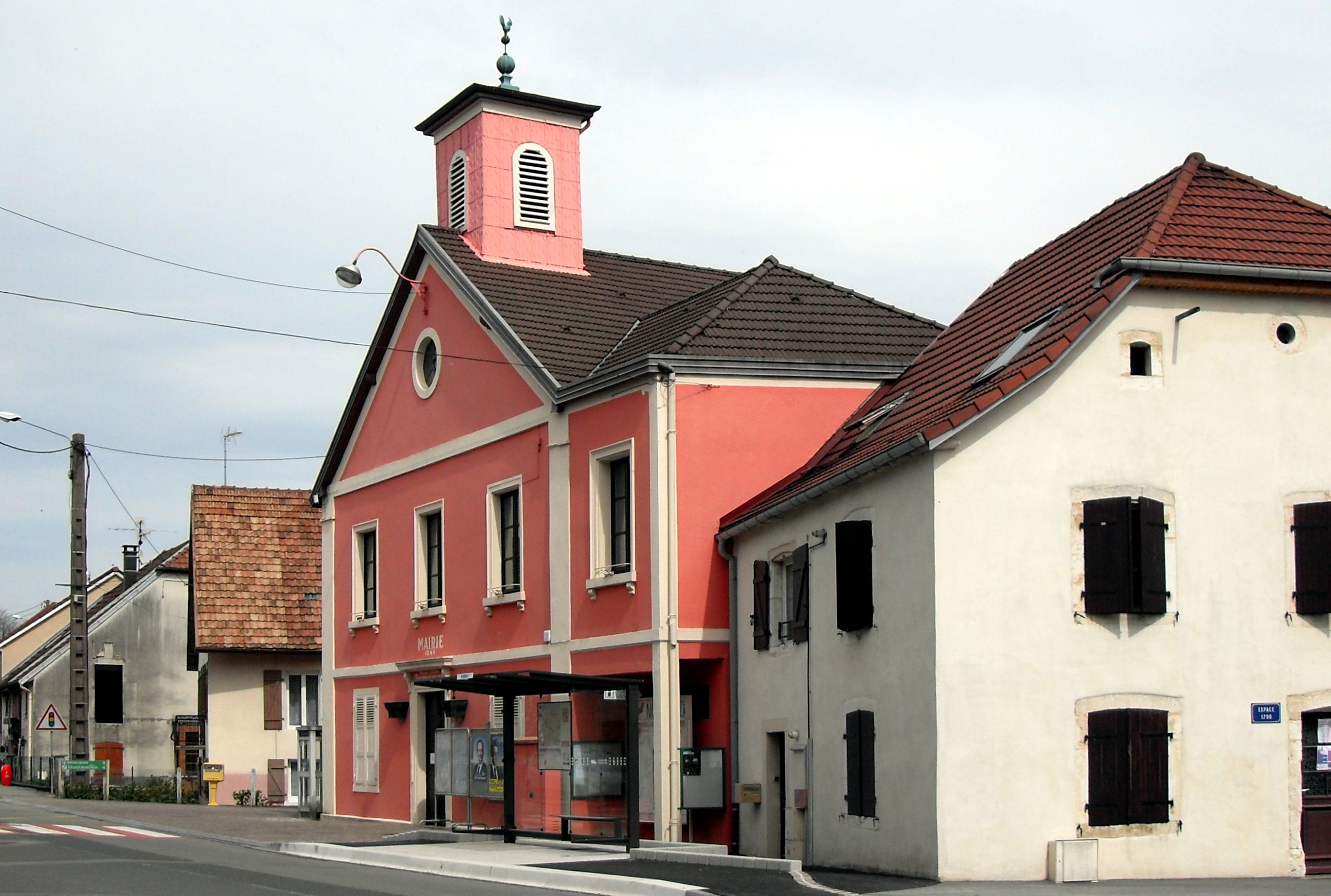 La mairie de Nommay